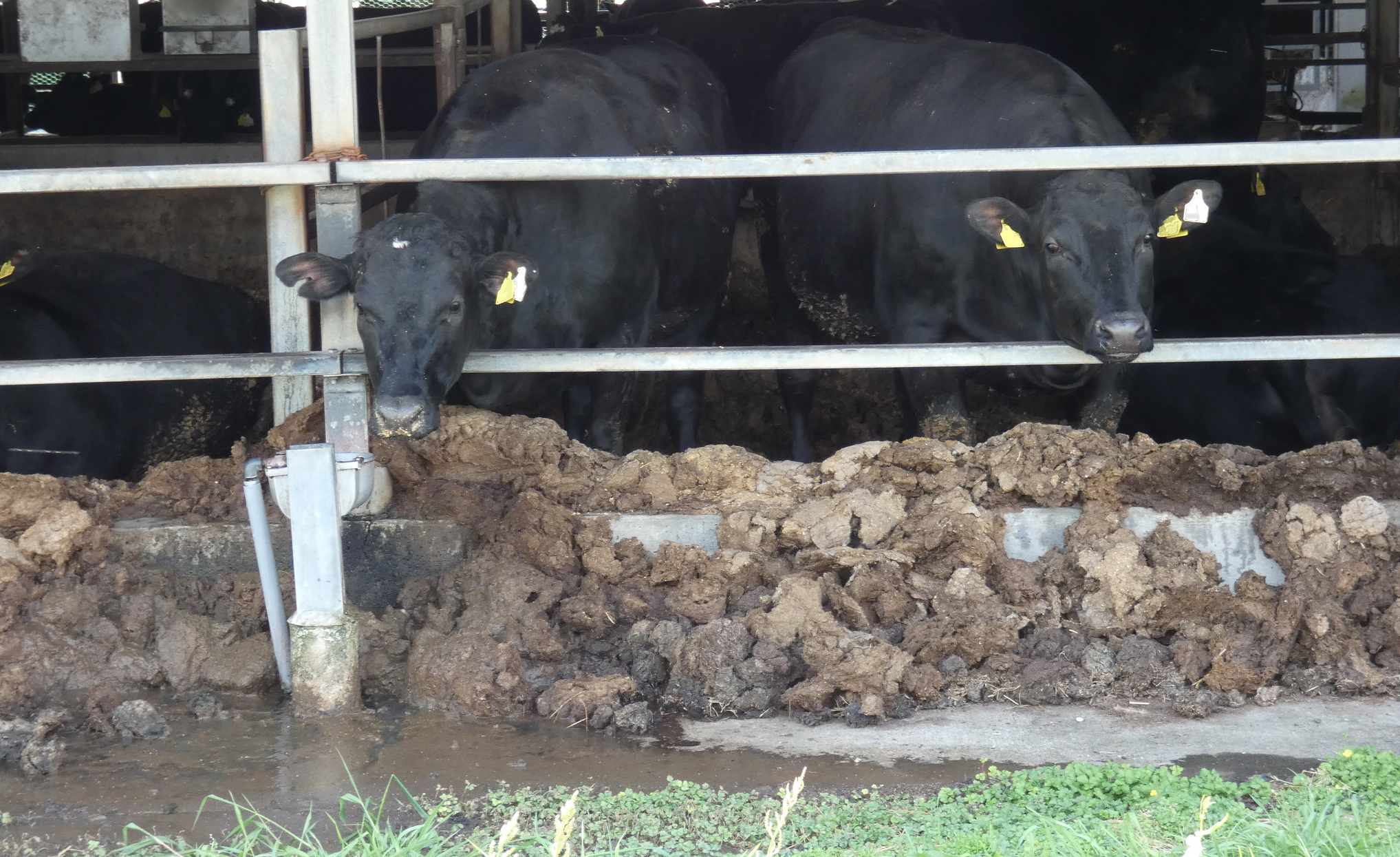 牛舎で飼育される 種類によって異なるが生後2-3年で出荷される